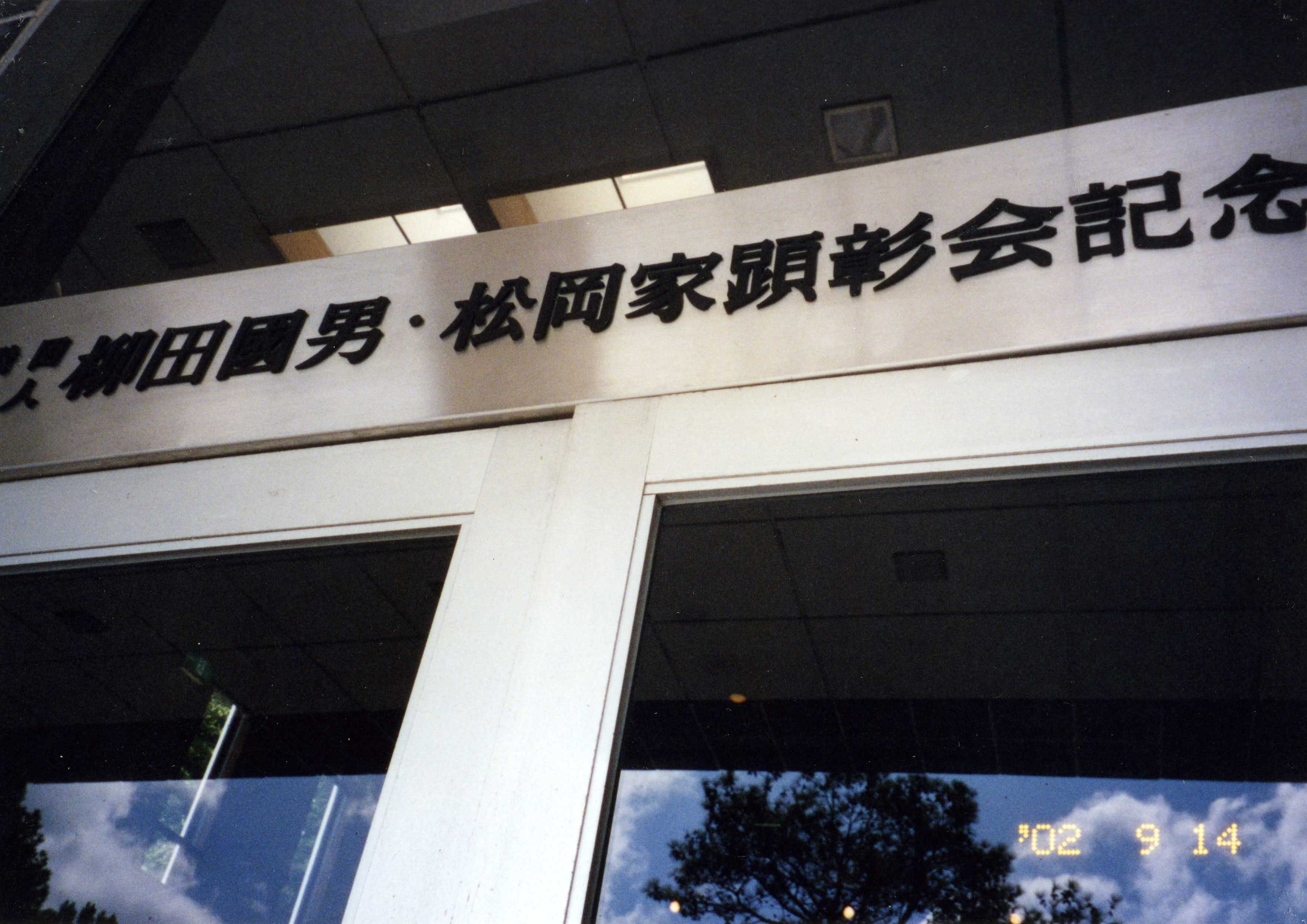 柳田國男・松岡家顕彰記念館